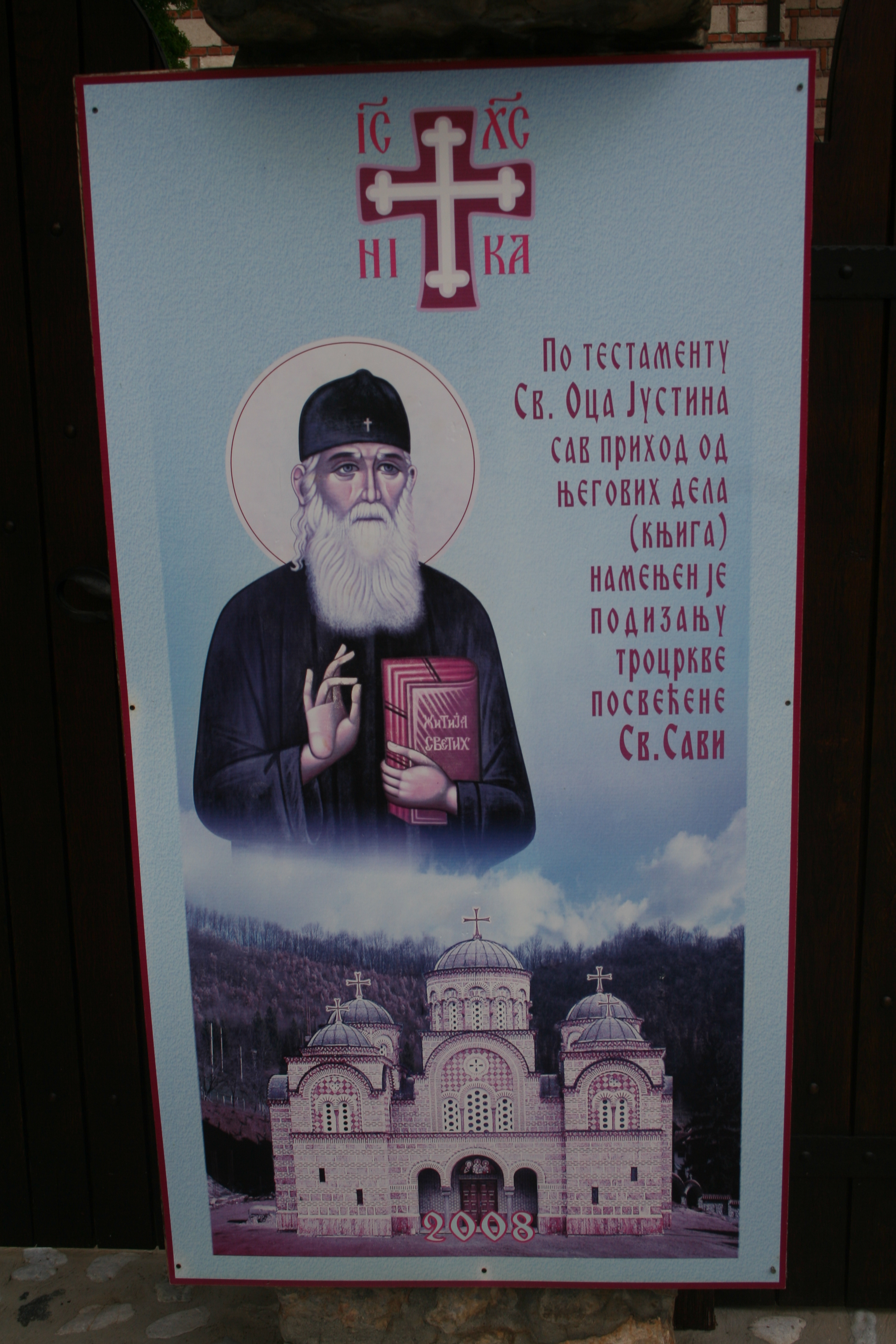 Manastir Ćelije